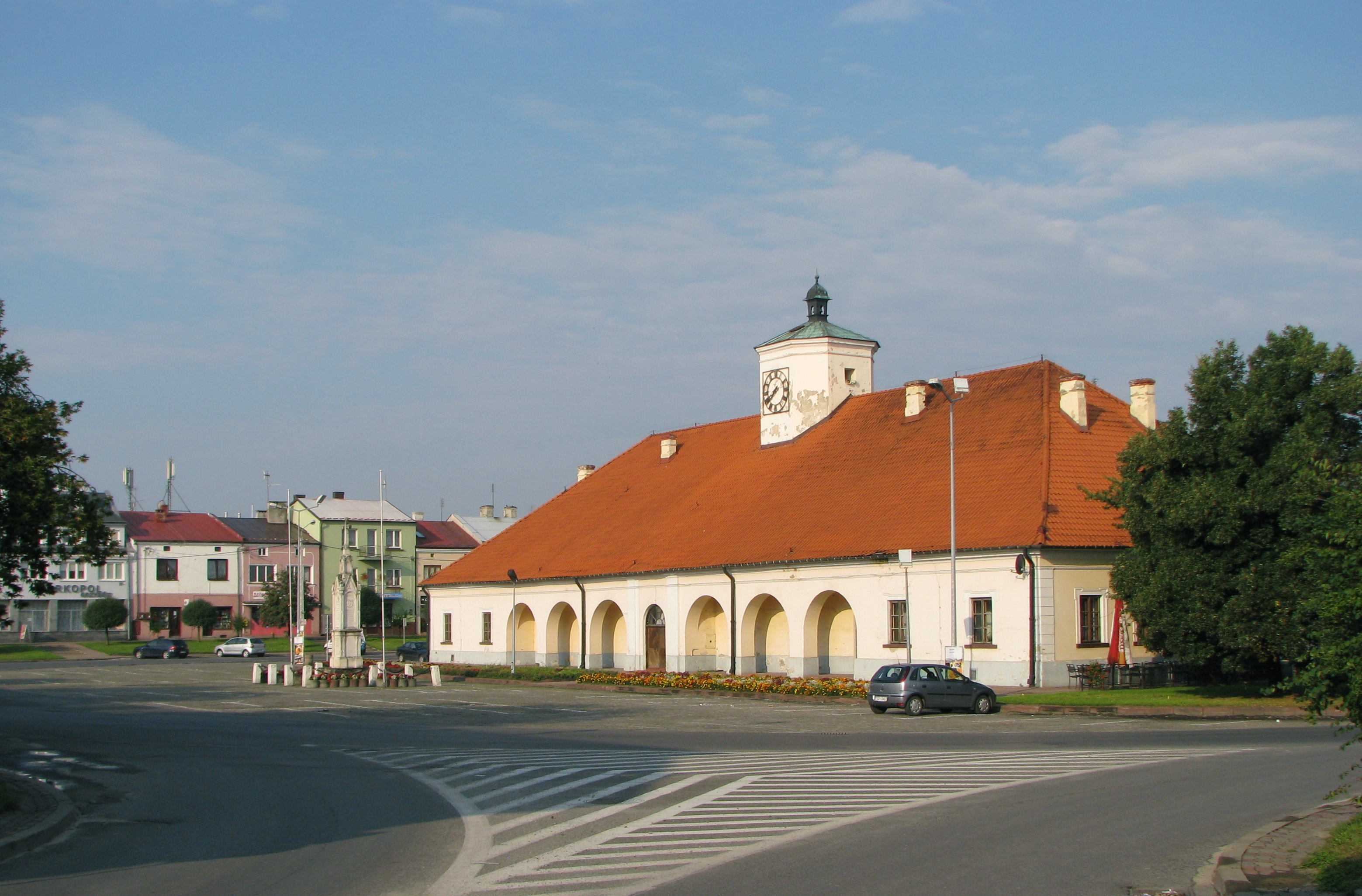 Ratusz w centrum rynku, Staszów, Polska. Elewacja od strony wschodniej.